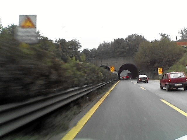 Foto de la galería Cassia Vecchia desde el sur.